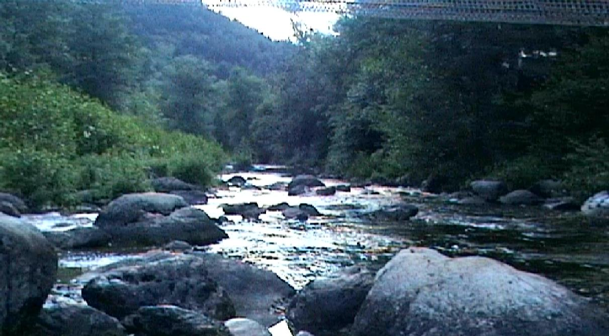 De river Jonte near Meyrueis, dep. Lozère, France